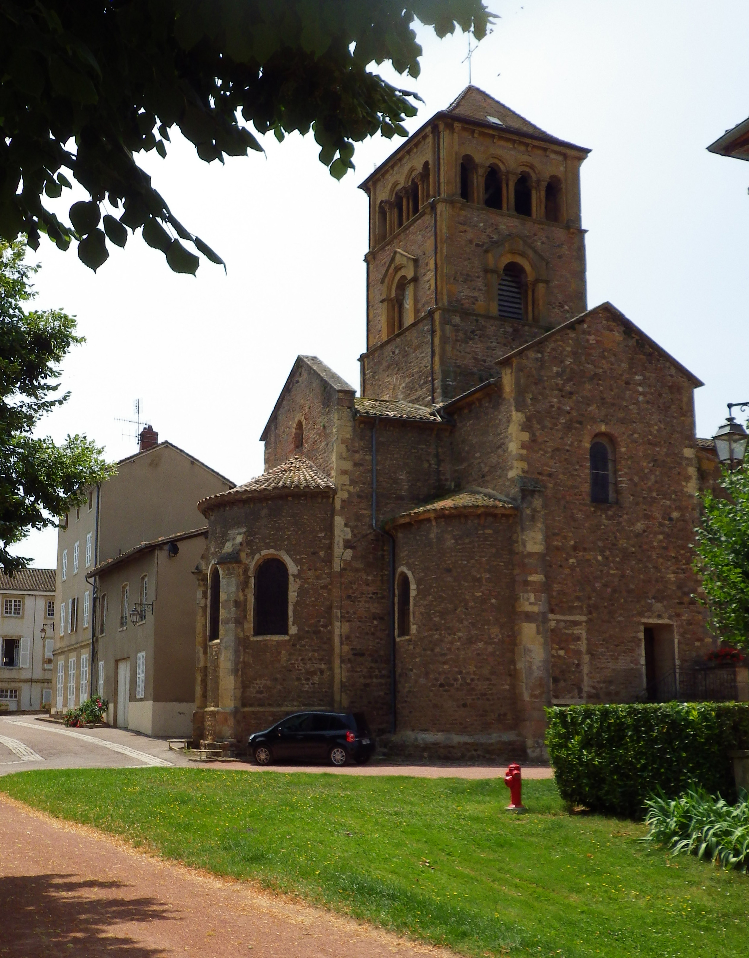 Eglise abside